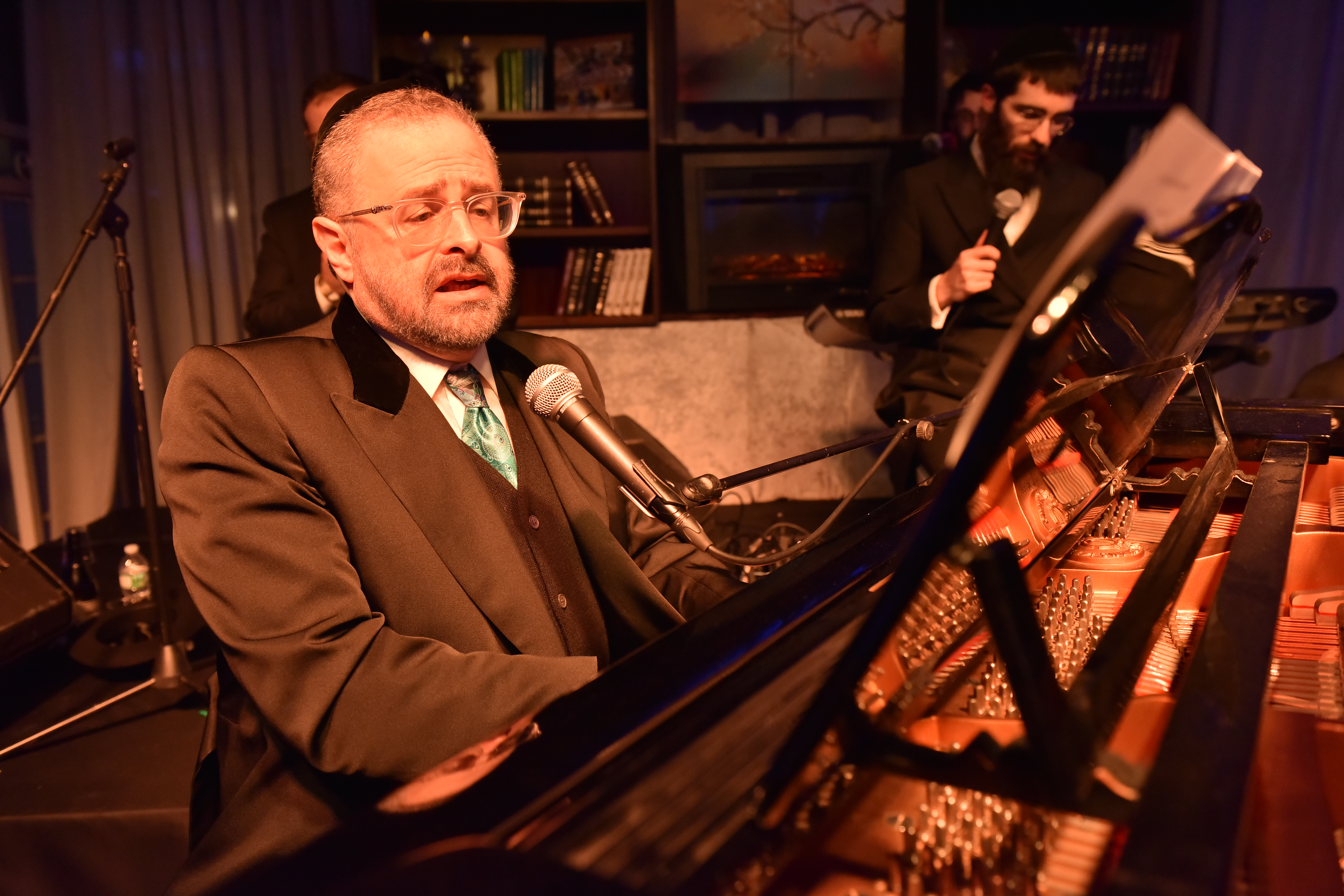 Yossi Green